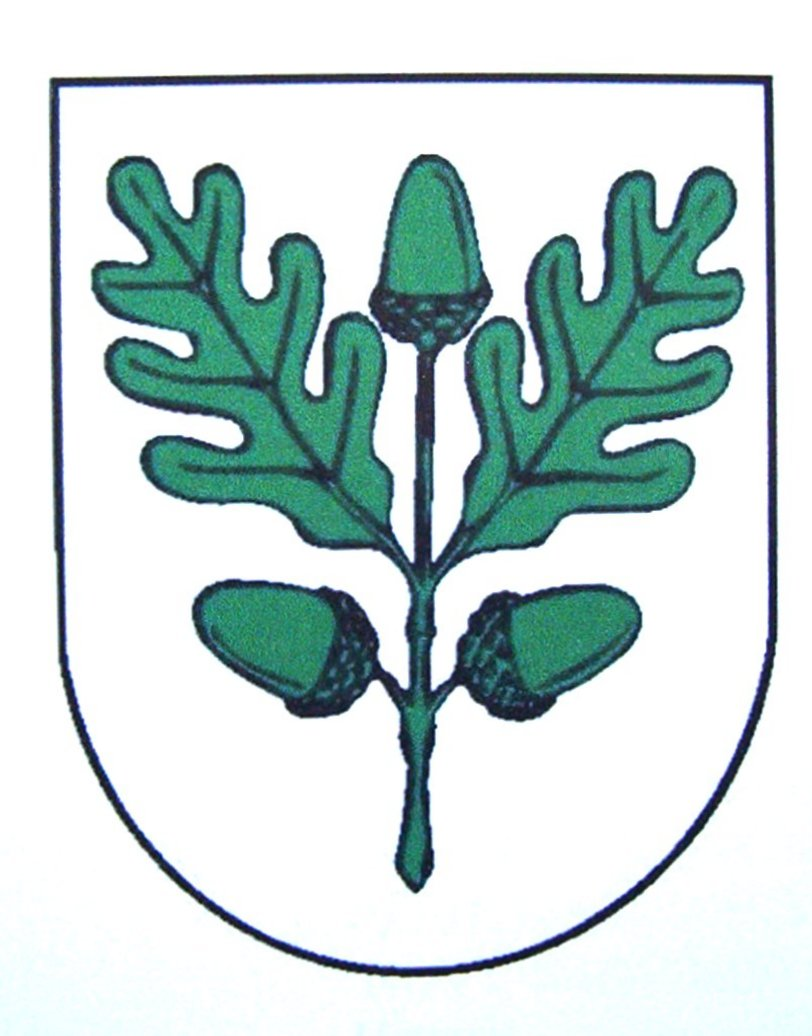 znak města Dubá